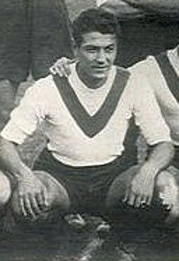 Noël Sinibaldi en 1947 (ancien TFC).